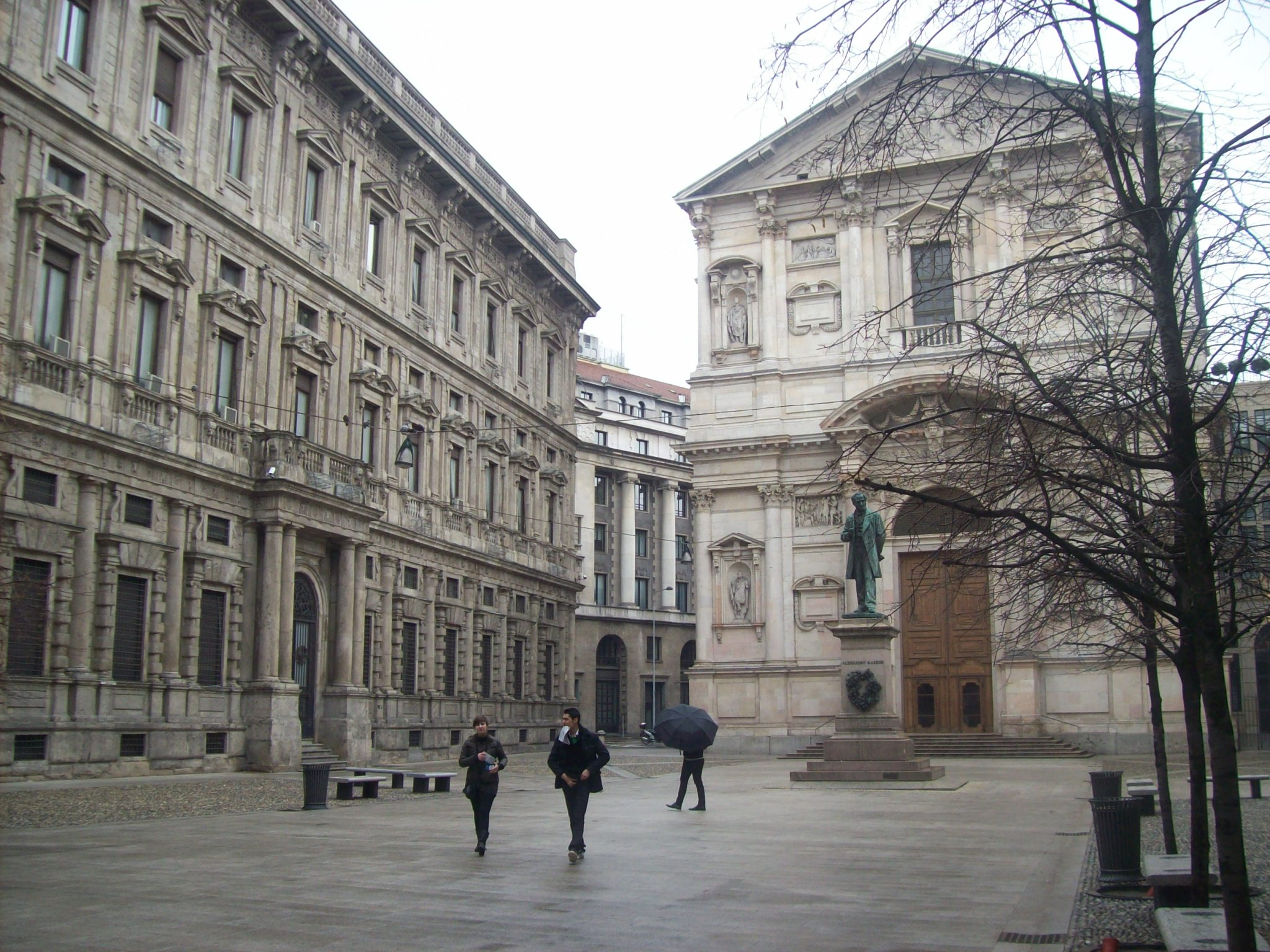 Piazza San Fedele a Milano.